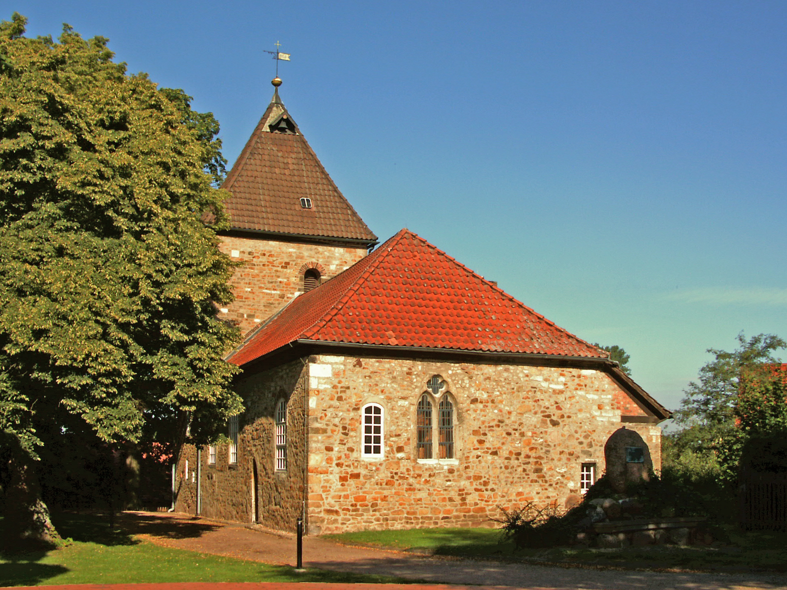 Evangelische St. Nicolai-Kirche in Hattorf, Ortsteil von Wolfsburg